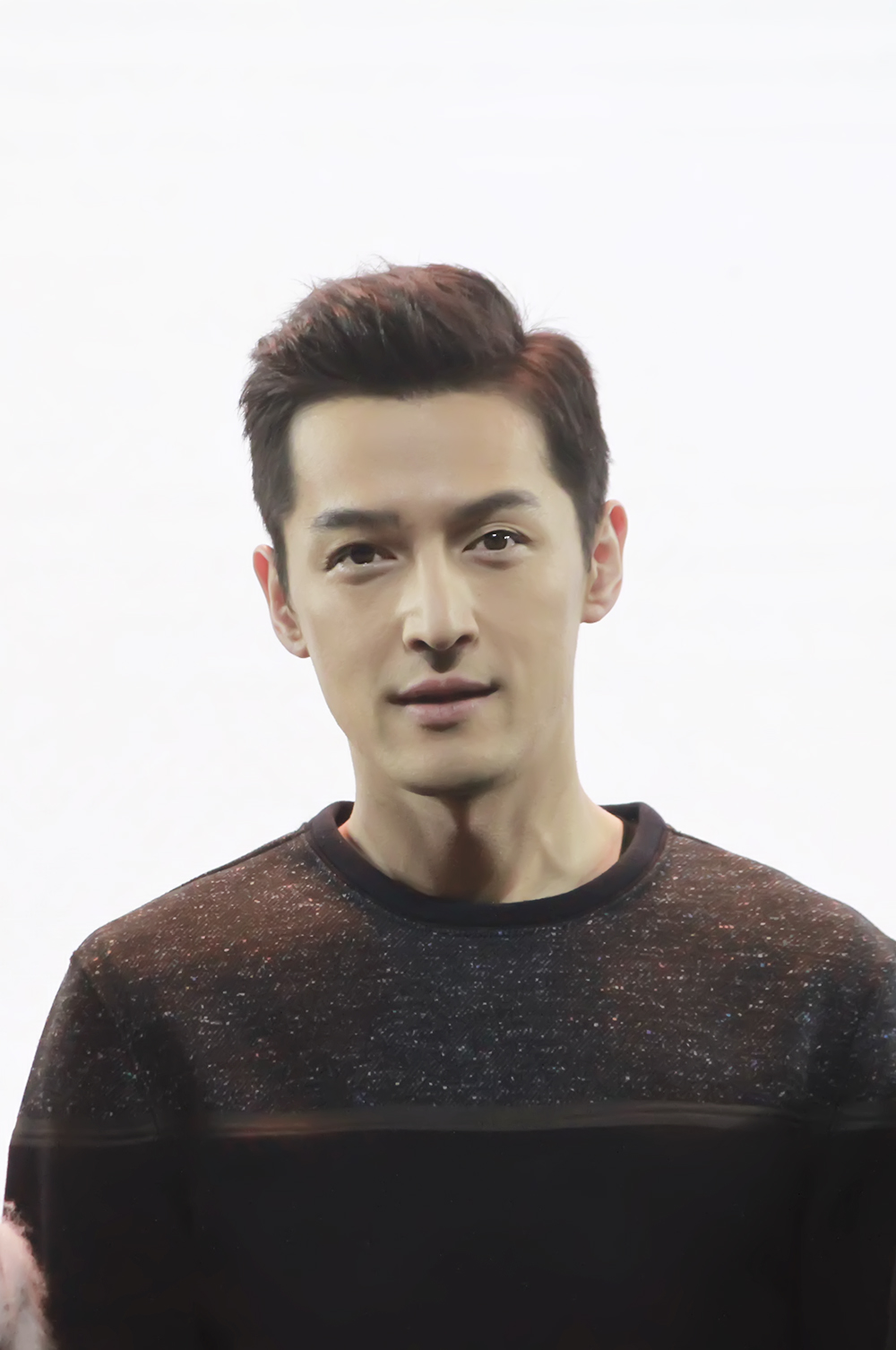 中文（中国大陆）: 拍摄于751D-PARK北京时尚广场79罐，大话西游品牌前瞻发布会